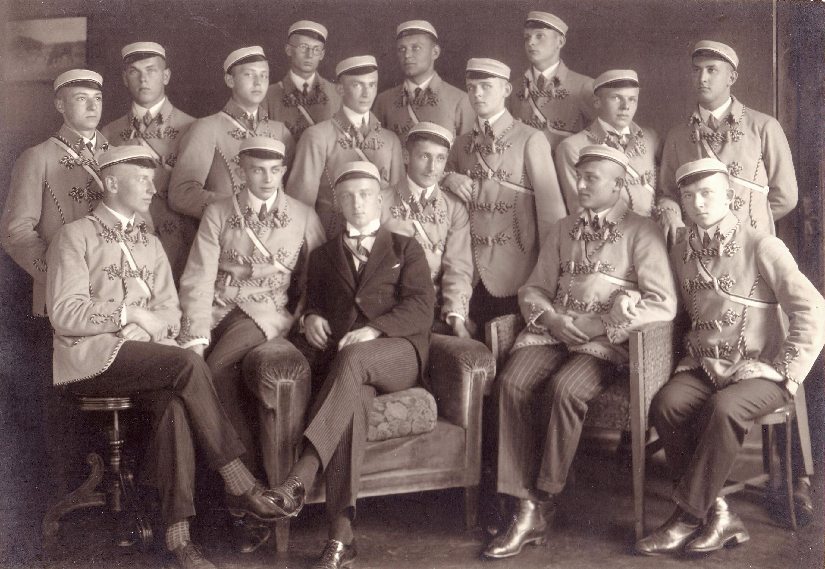 Fuchsmajor und Füchse des Corps Masovia im Sommersemester 1926. In der Mitte der Fuchsmajor Gerhard Uhlemann (1903–1969).